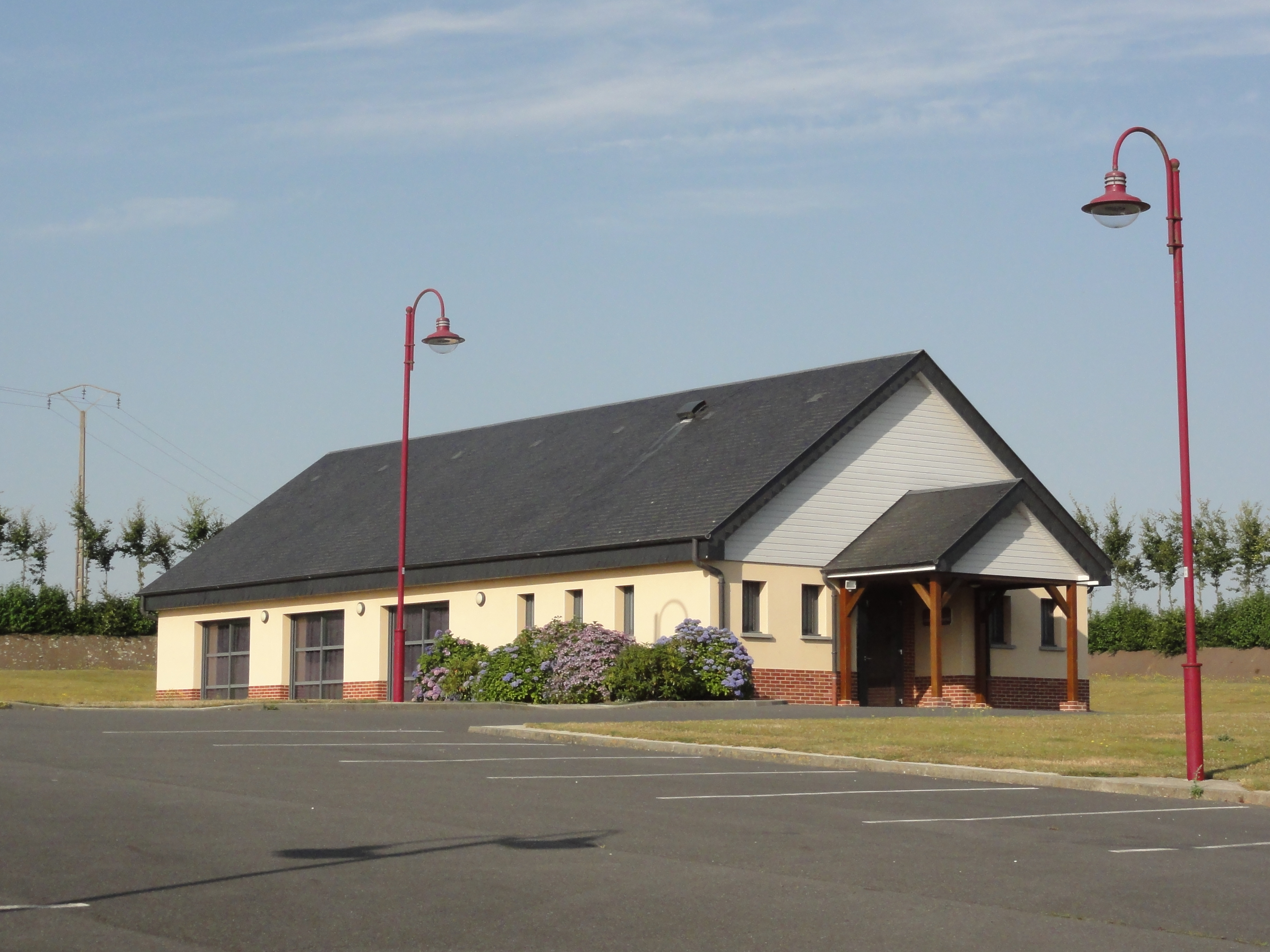 Saint-Gilles-de-Crétot (Seine-Mar.) salle des fêtes